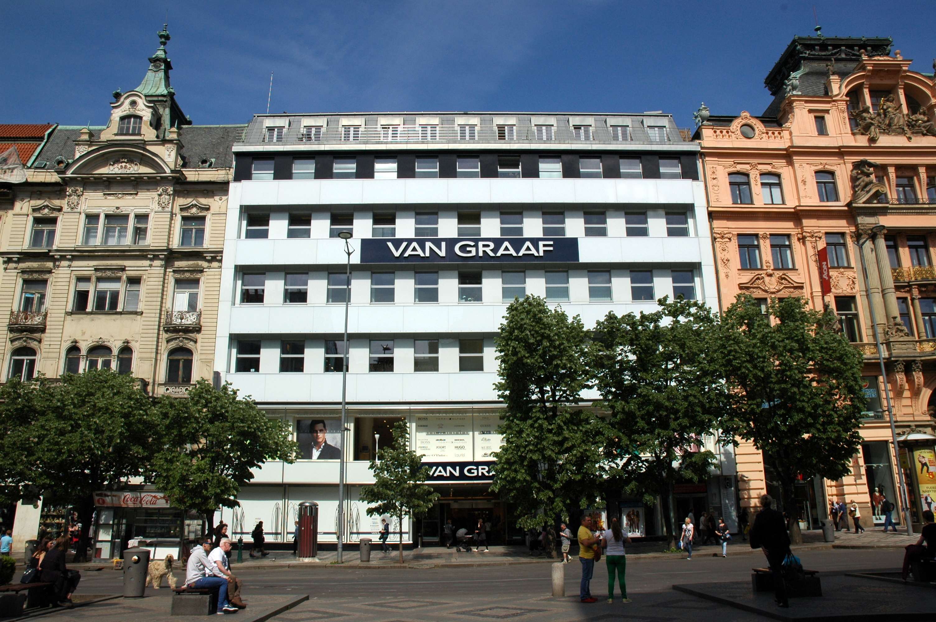 Václavské náměstí (Praha)